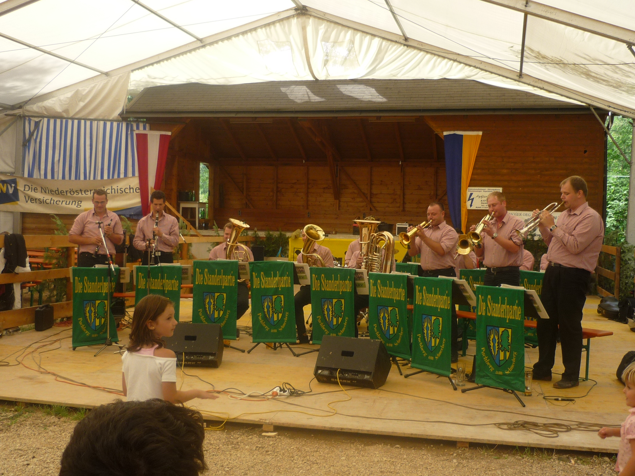 Die Standerlpartie beim Au-Fest in Puchberg am Schneeberg